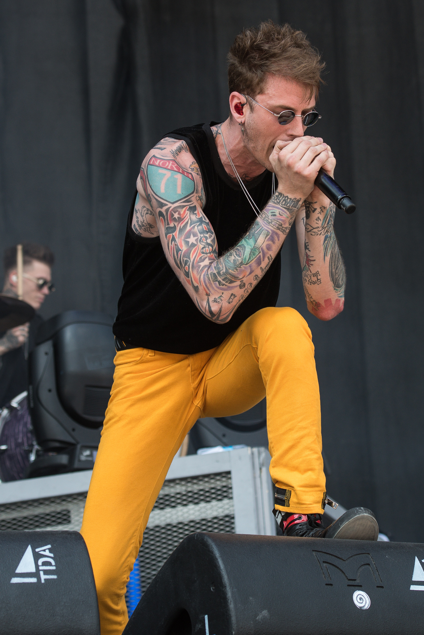 ARGO-Konzerte,Beck's Park Stage,Colson Baker,Konzert,Livekonzert,Livemusik,MGK,Machine Gun Kelly,Musik,RiP,Rock im Park 2017